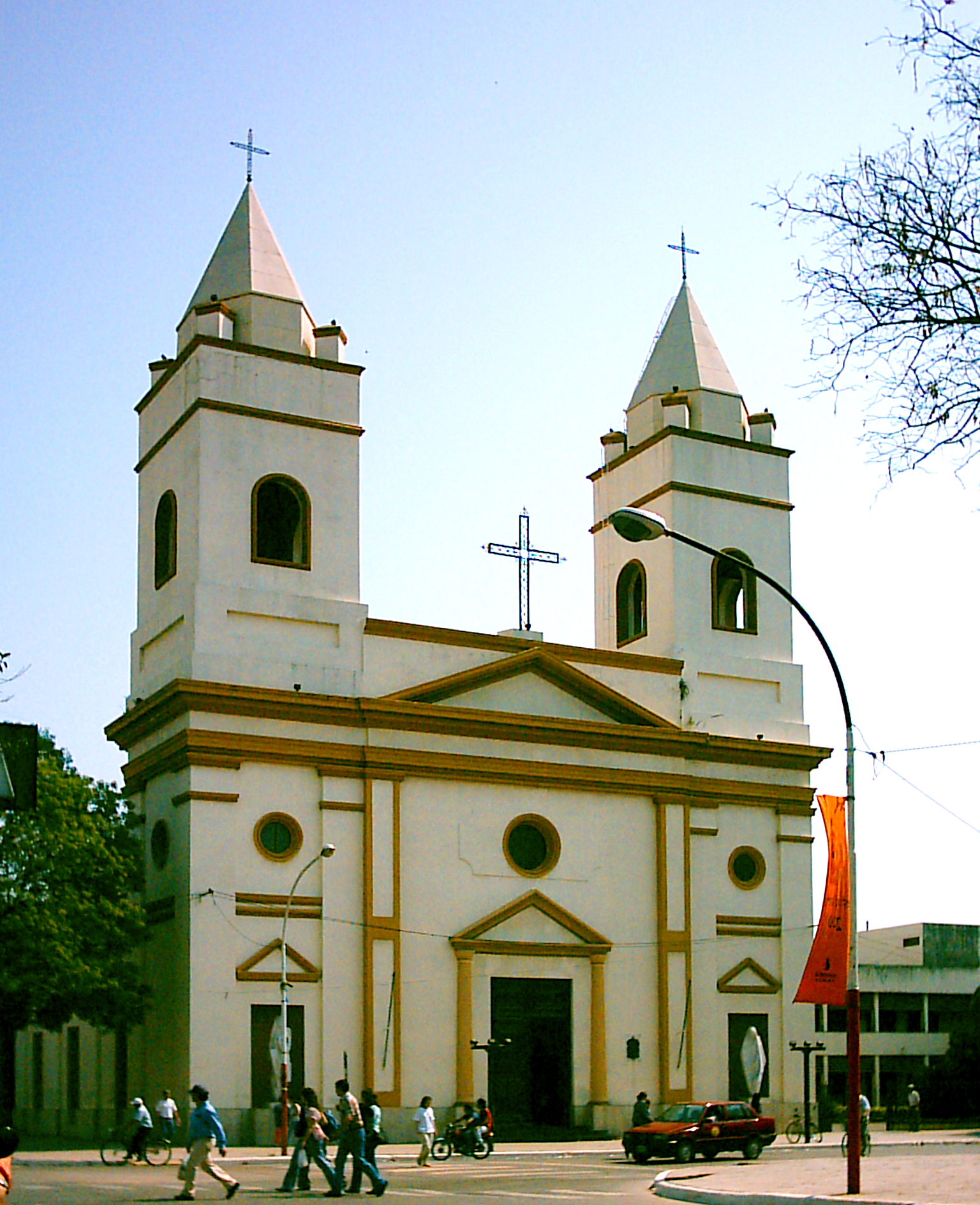 Fachada de la Catedral de Resistencia, Chaco